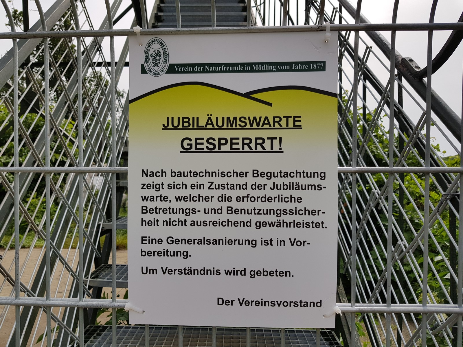 Die Jubiläumswarte am Anninger ist seit Mai 2019 gesperrt.